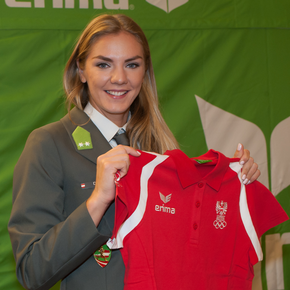 Einkleidung der Österreichischen Teilnehmer an den Olympischen Sommerspielen 2016 am 16./17. Juli 2016 in Wien. Bild zeigt Ivona Dadic.